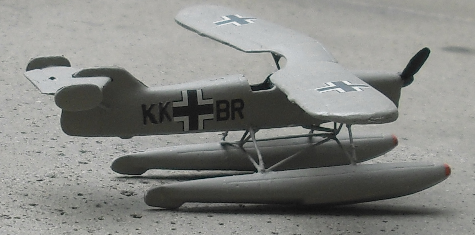 Modell der Arado 231 seitlich